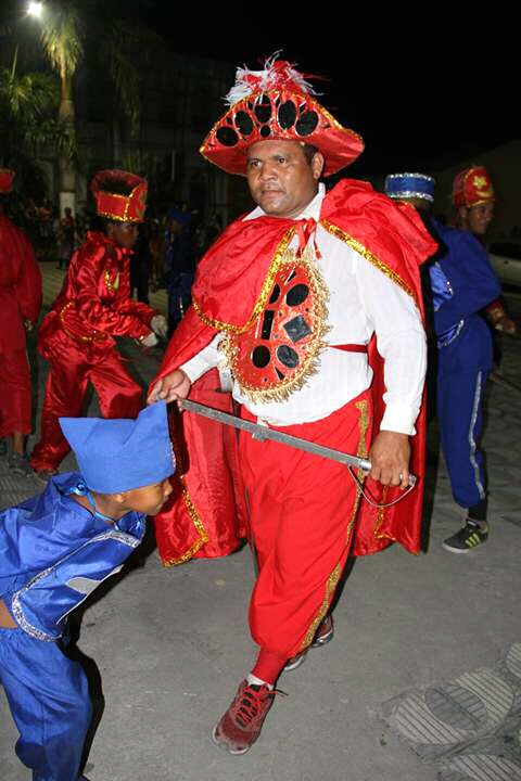 Vvvbb